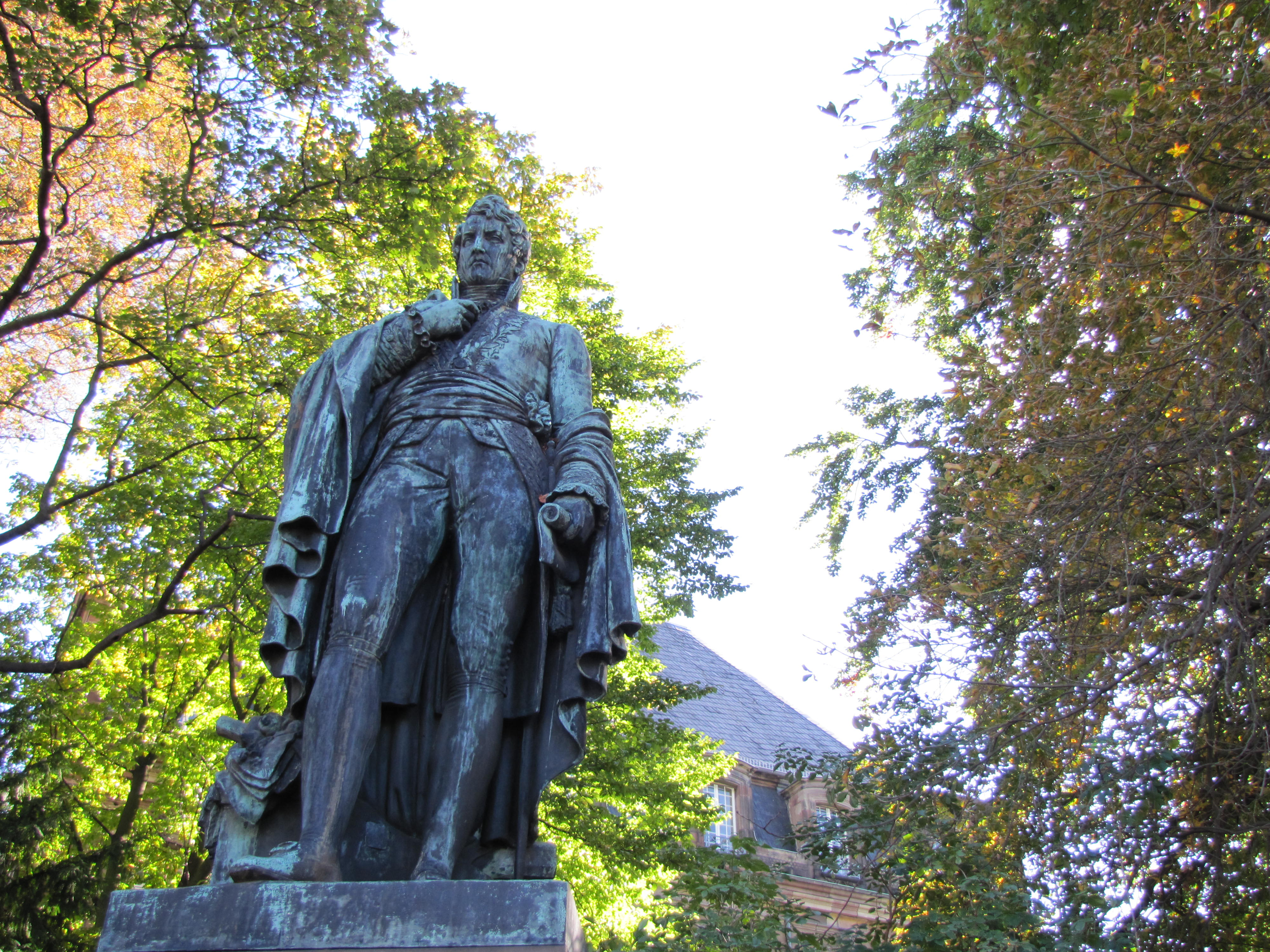 Alsace, Bas-Rhin, Strasbourg, Statue de Lezay-Marnésia (1855, Philippe Grass), quai Lezay-Marnésia.